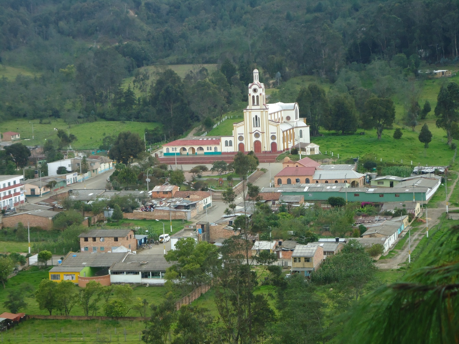 Panorámica desde el sur, del área urbana del municipio de San Miguel de Sema, Boyacá, Colombia.